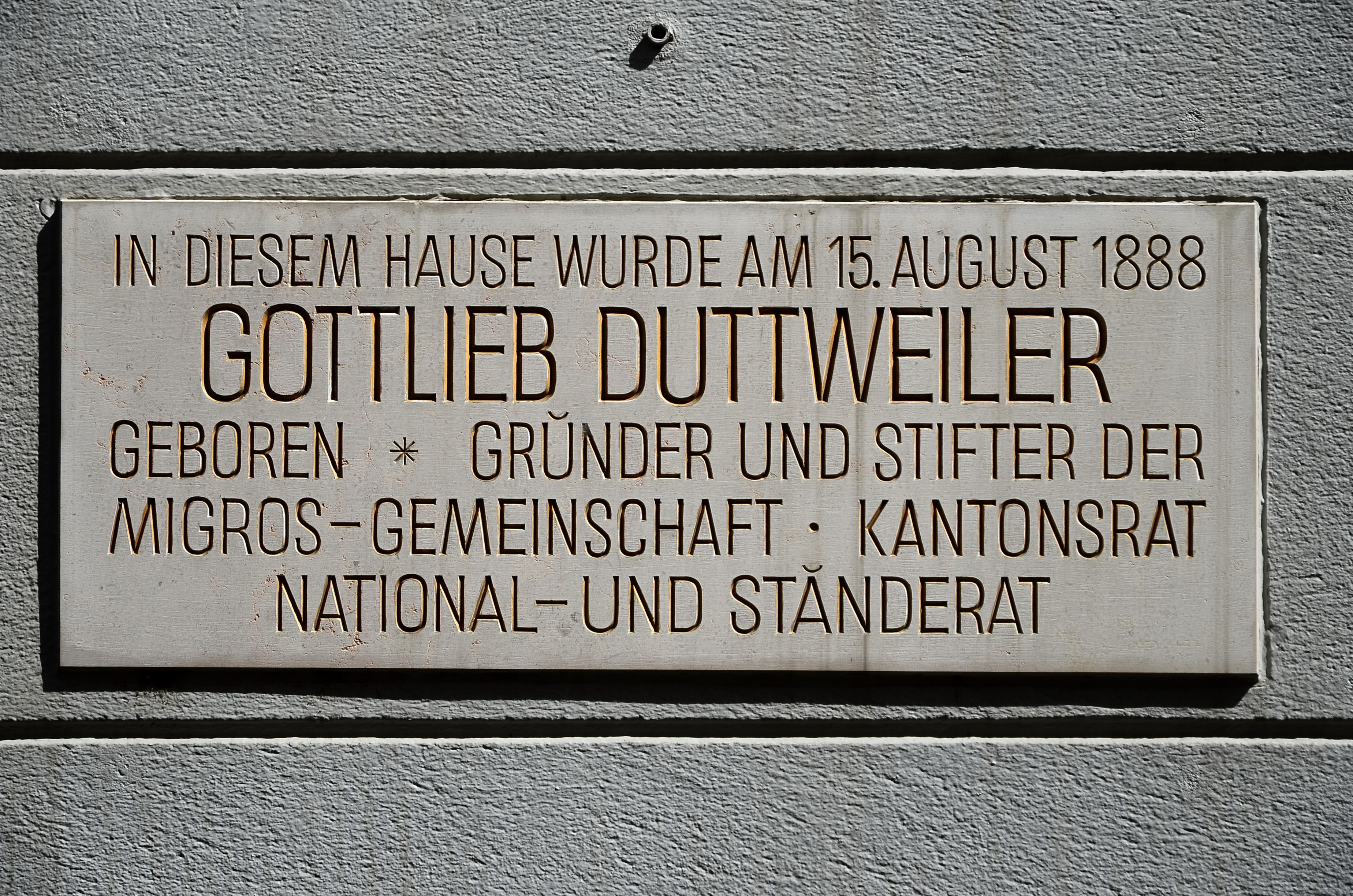 Strehlgasse 13 (Gottlieb Duttweiler) in Zürich-Lindenhof (Switzerland)